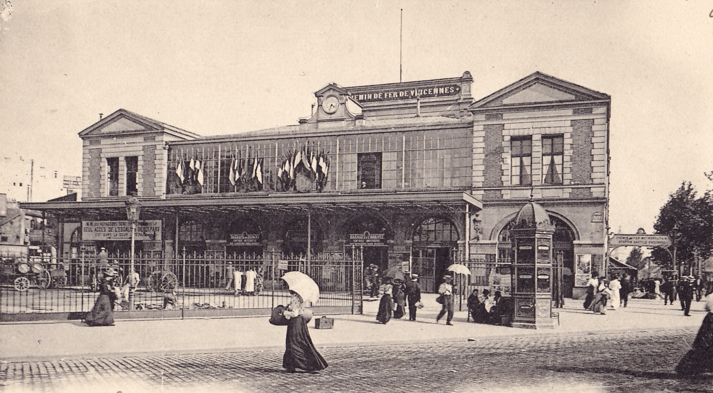 Détail d'une carte postale ancienne sans mention d'éditeur, n°83 : PARIS - La Gare de Vincennes